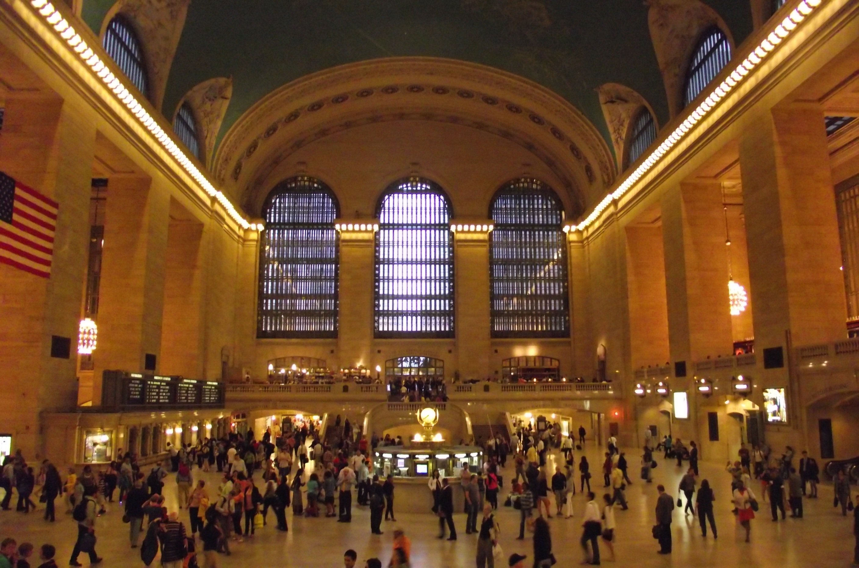 Die New Yorker Grand Central Station von innen